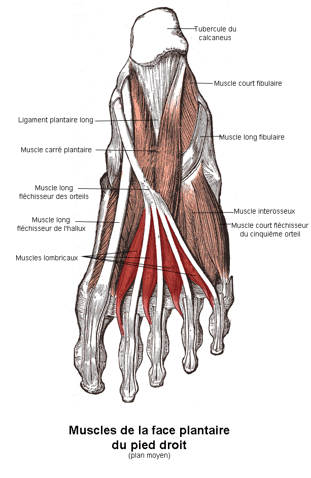 Muscles lombricaux du pied